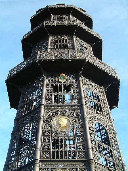 König-Friedrich-August-Turm auf dem Löbauer Berg